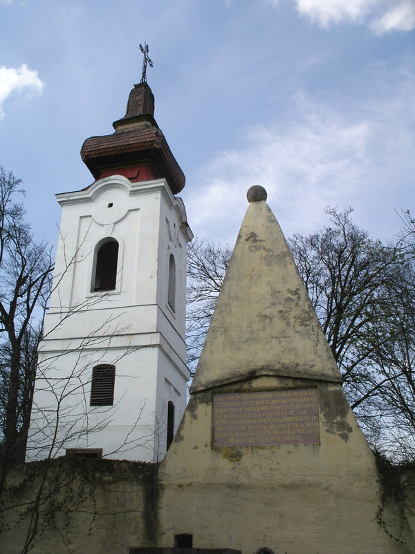 Alsópetény Szent István király római katolikus templom